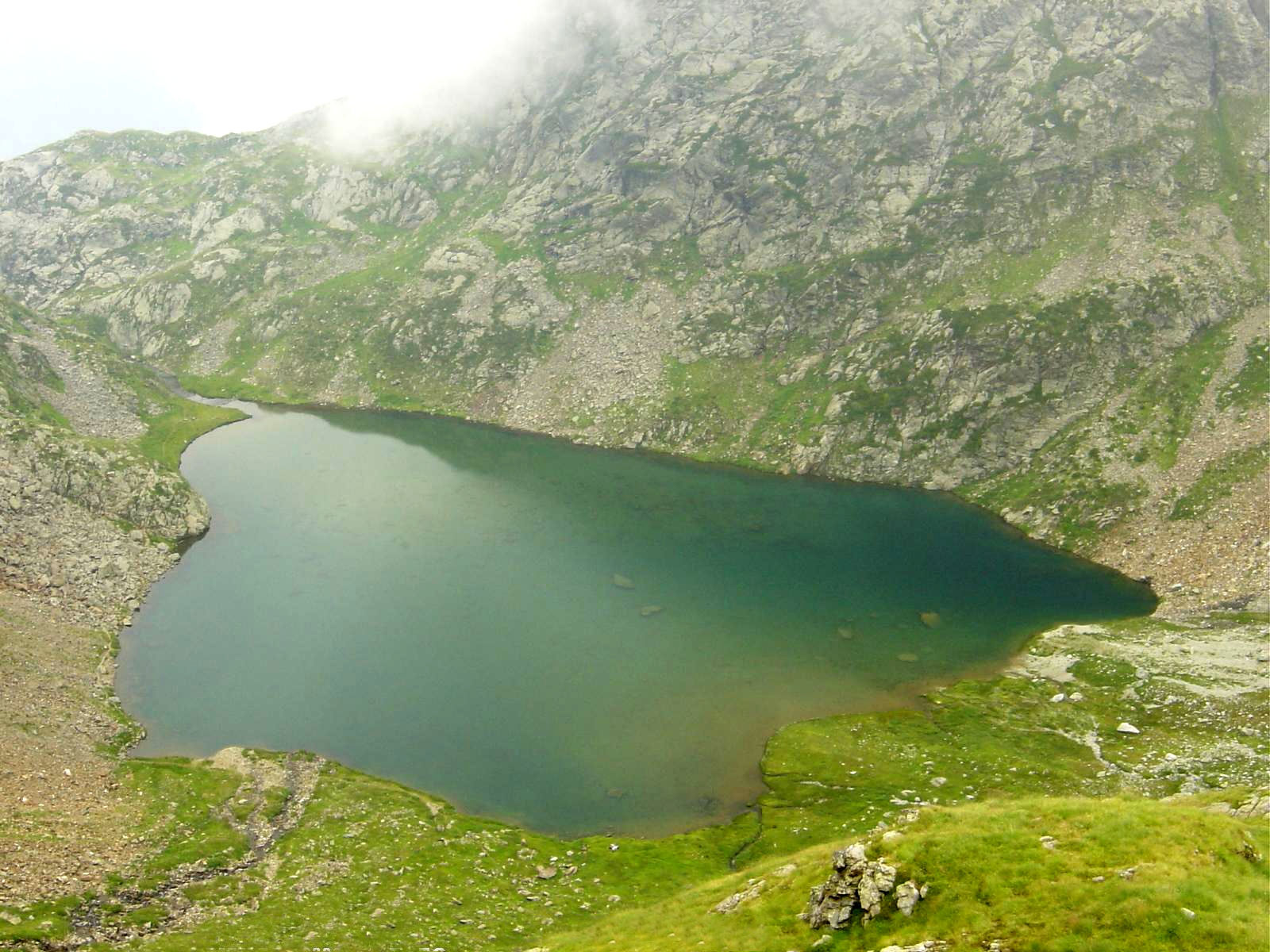 Un'altra foto del Lago Bianco. Autore: Delpo